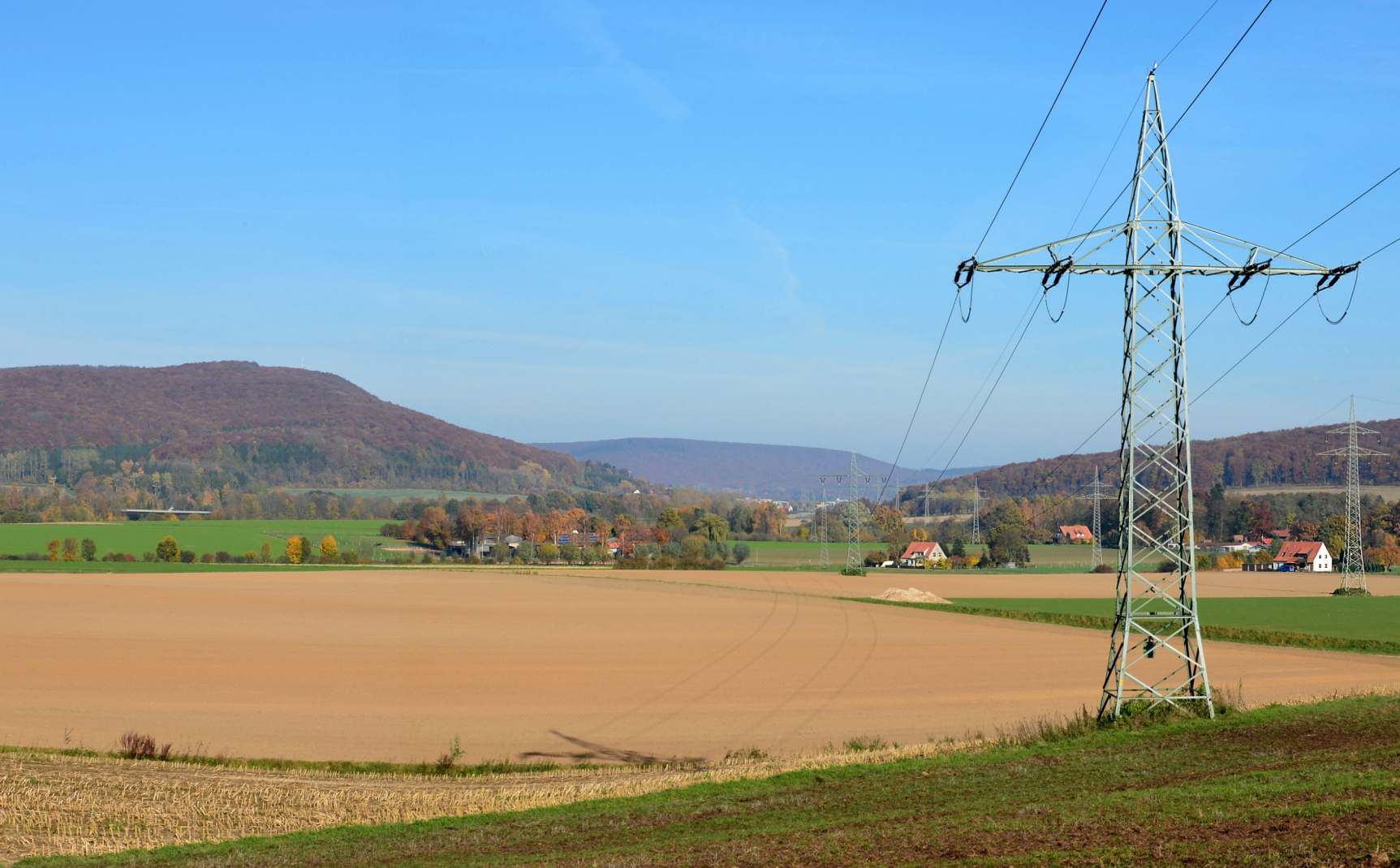 Deisterpforte vom Katzberg; Bahnstromleitung Rethen–Hameln/Rethen–Löhne